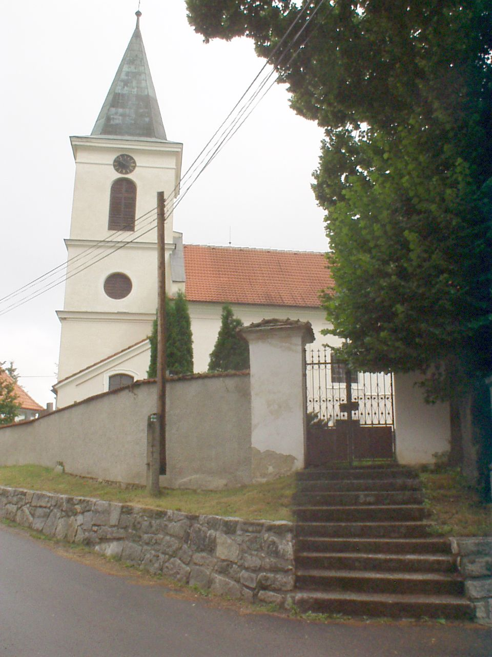 kostel Nejsvětější Trojice postavený původně ve 14. století v gotickém slohu, přestavěný barokně v roce 1722 a opravovaný v roce 1933 a v 90. letech 20. století